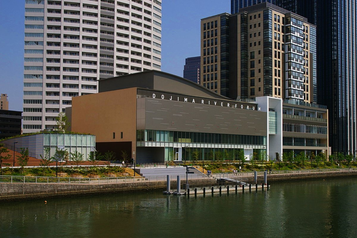 Dojima River Forum, at Hotarumachi, Fukushimaku, Osaka City, Japan.